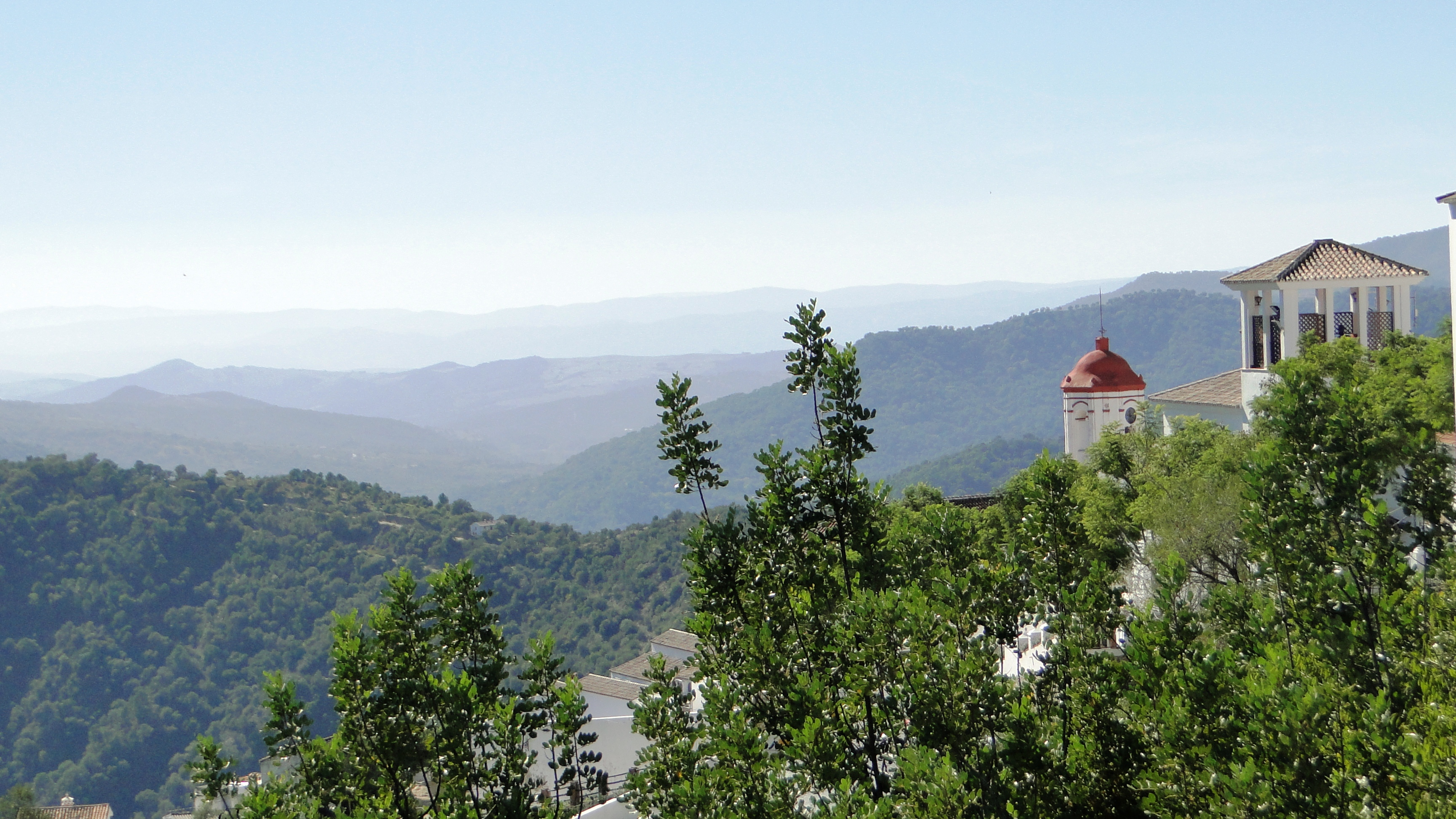 Genalguacil (Málaga) - Valle del Genal